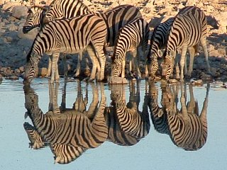 Réflet à la surface d'une mare, Zèbres de Burchell, Etosha, juillet 2006, photo personnelle Catégorie:optique géométrique Catégorie:zoologie